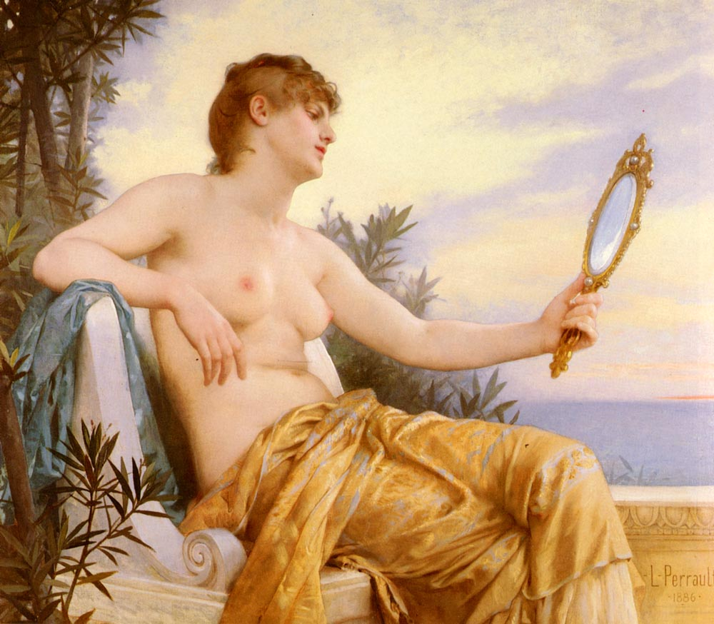 Vanitas